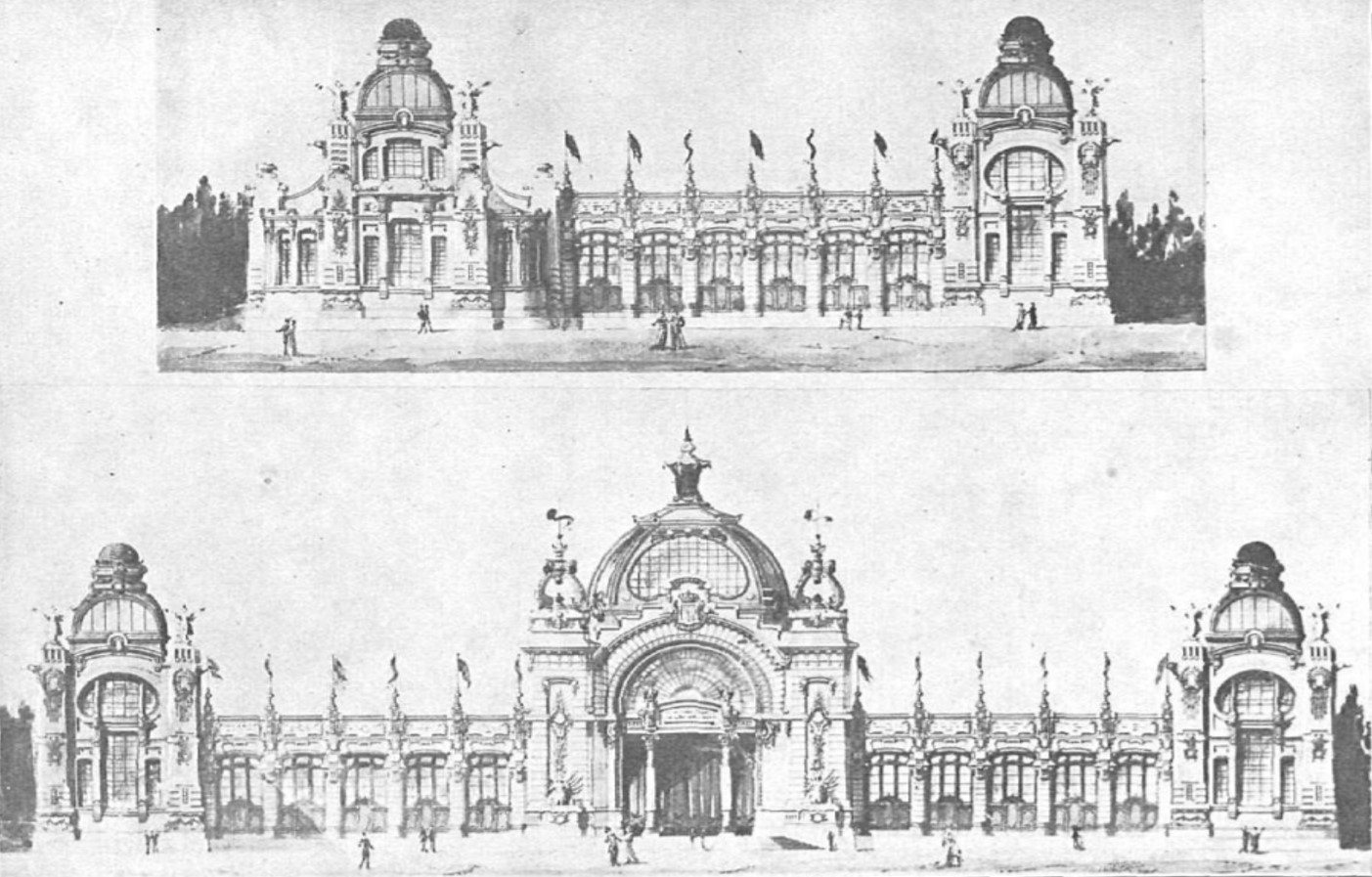 Dibujo del Palacio Central de la Exposición de Industrias Madrileñas, celebrada en el Parque del Retiro de Madrid en 1907. Fue proyectado por el arquitecto Luis Bellido y González